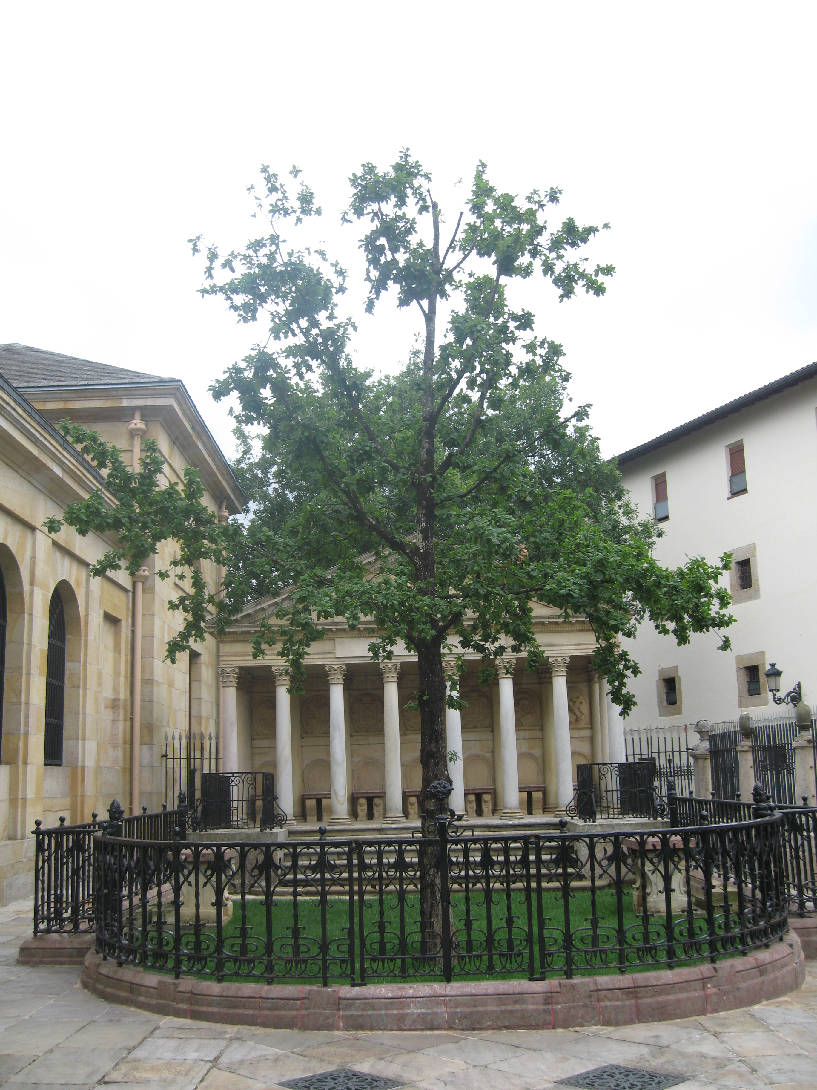 Arbol representativo de las libertades de Vizcaya. El original ya no esta presente, en su lugar hay plantado un retoño del mismo.